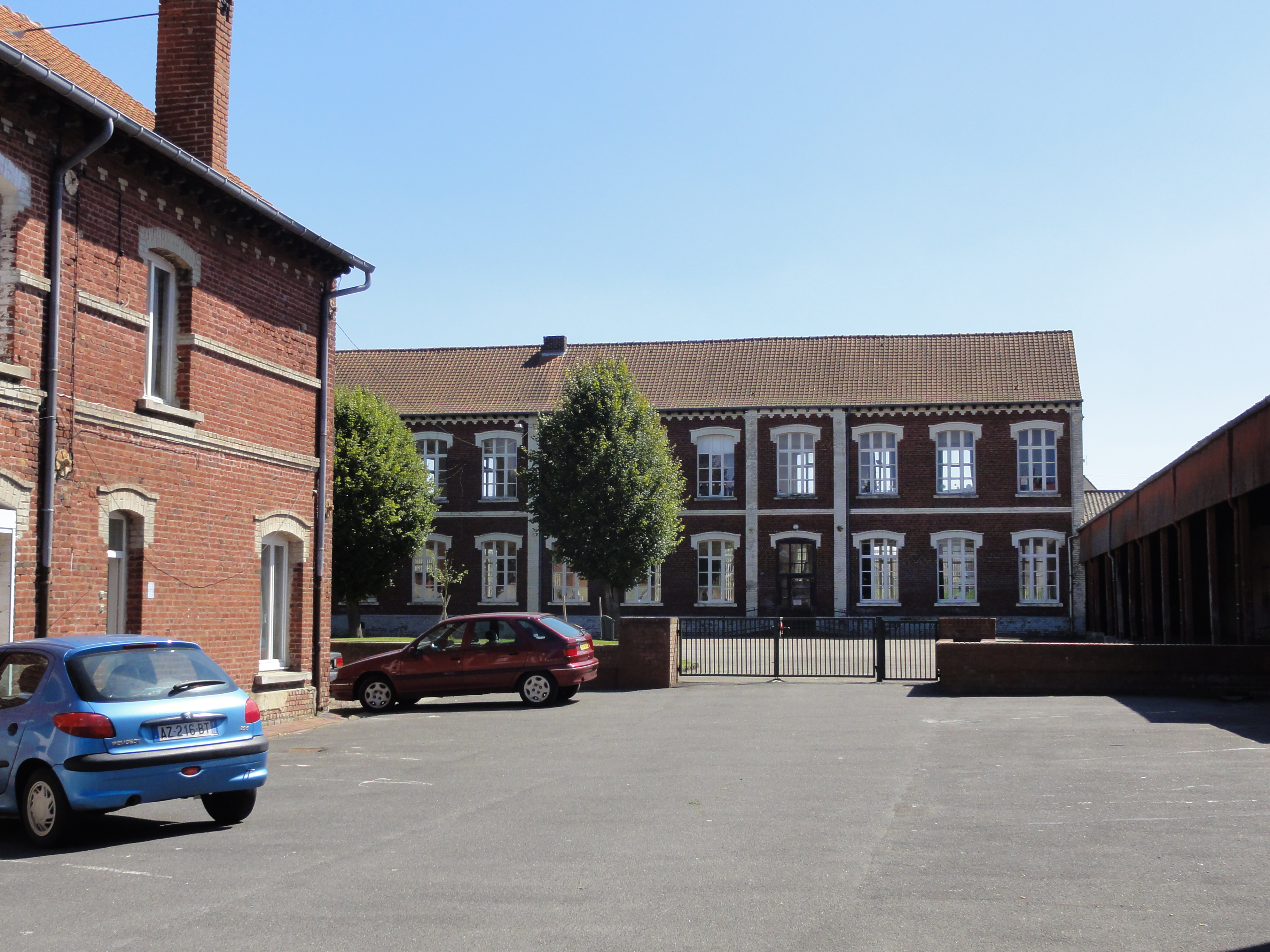 Écoles des cités de la fosse n° 7 - 7 bis de la Compagnie des mines de Bruay, Houdain, Pas-de-Calais, Nord-Pas-de-Calais, France.